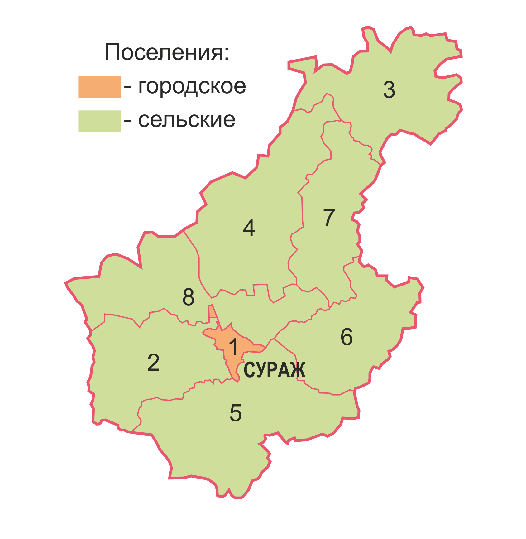 Схема административного деления Суражского района Брянской области РФ